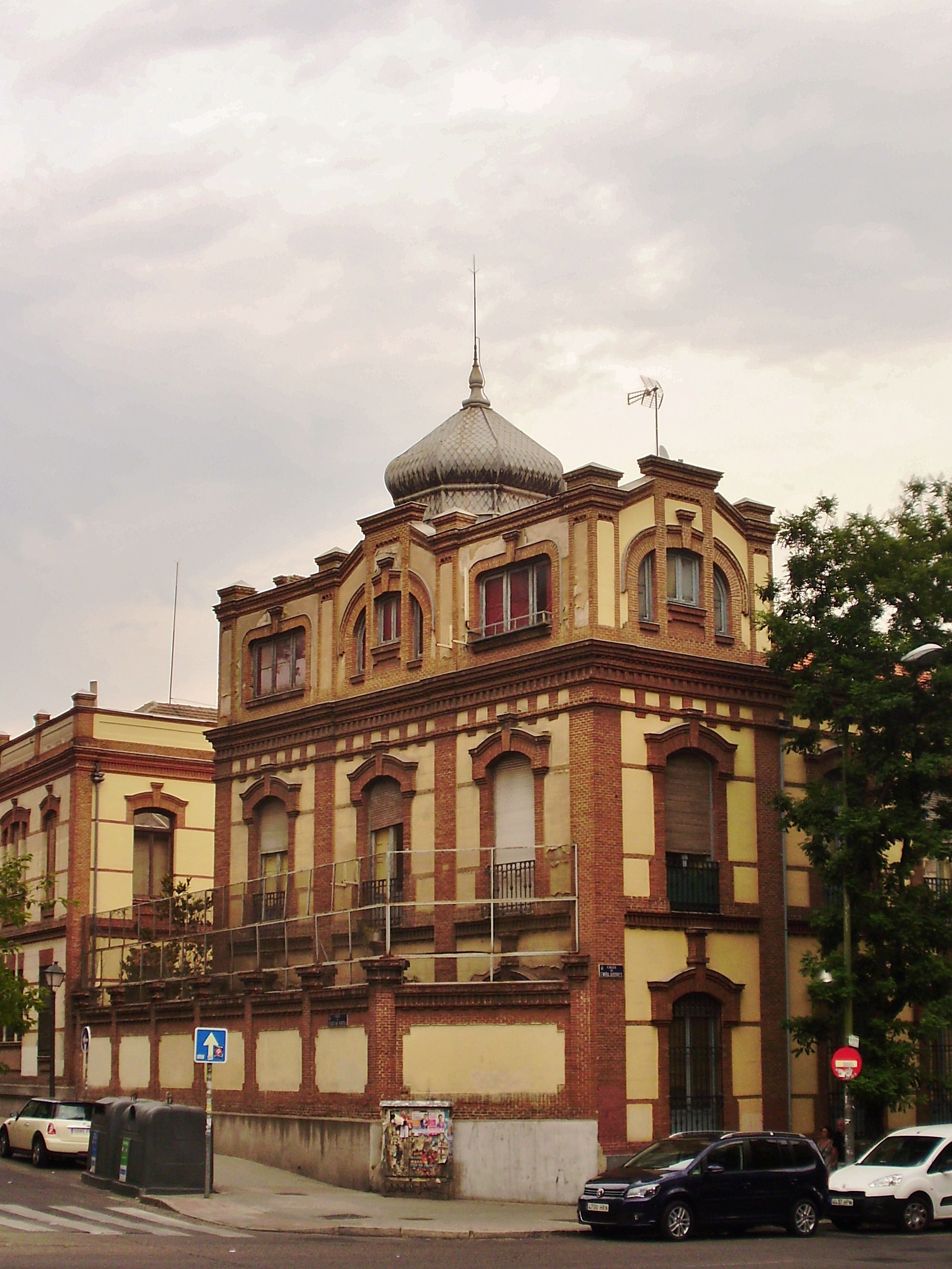 Esquina de la Calle Embajadores y la Calle Sebastián Herrera, en Madrid. Vista parcial del antiguo Instituto Farmaceútico del Ejército.